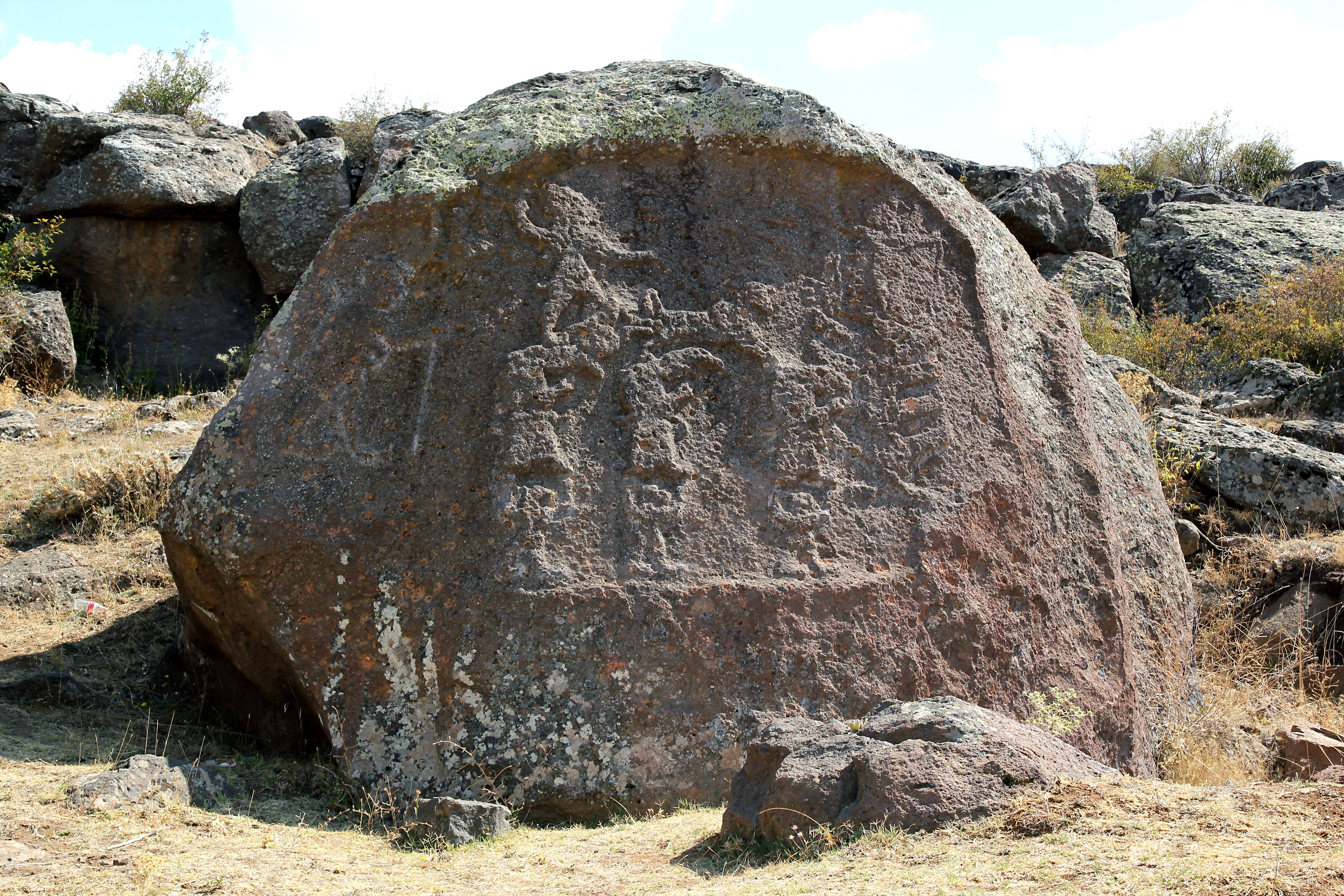 Hethitisches Felsrelief von İmamkullu (İmamkulu) bei Develi, Zentraltürkei